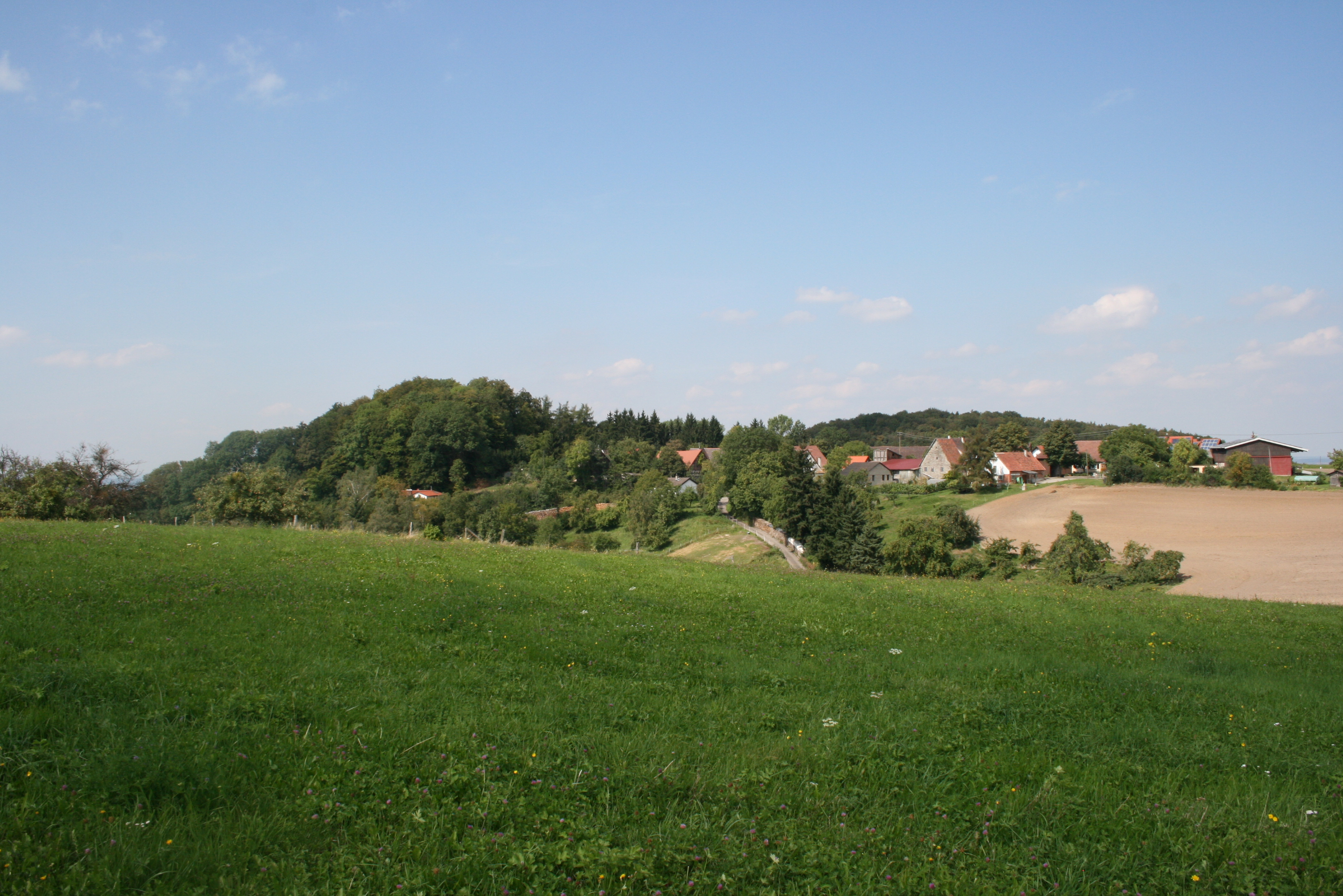 links der Burgberg in Pfedelbach-Obergleichen, rechts daneben der sogenannte Hinterweiler und rechts im Hintergrund der Zollknock